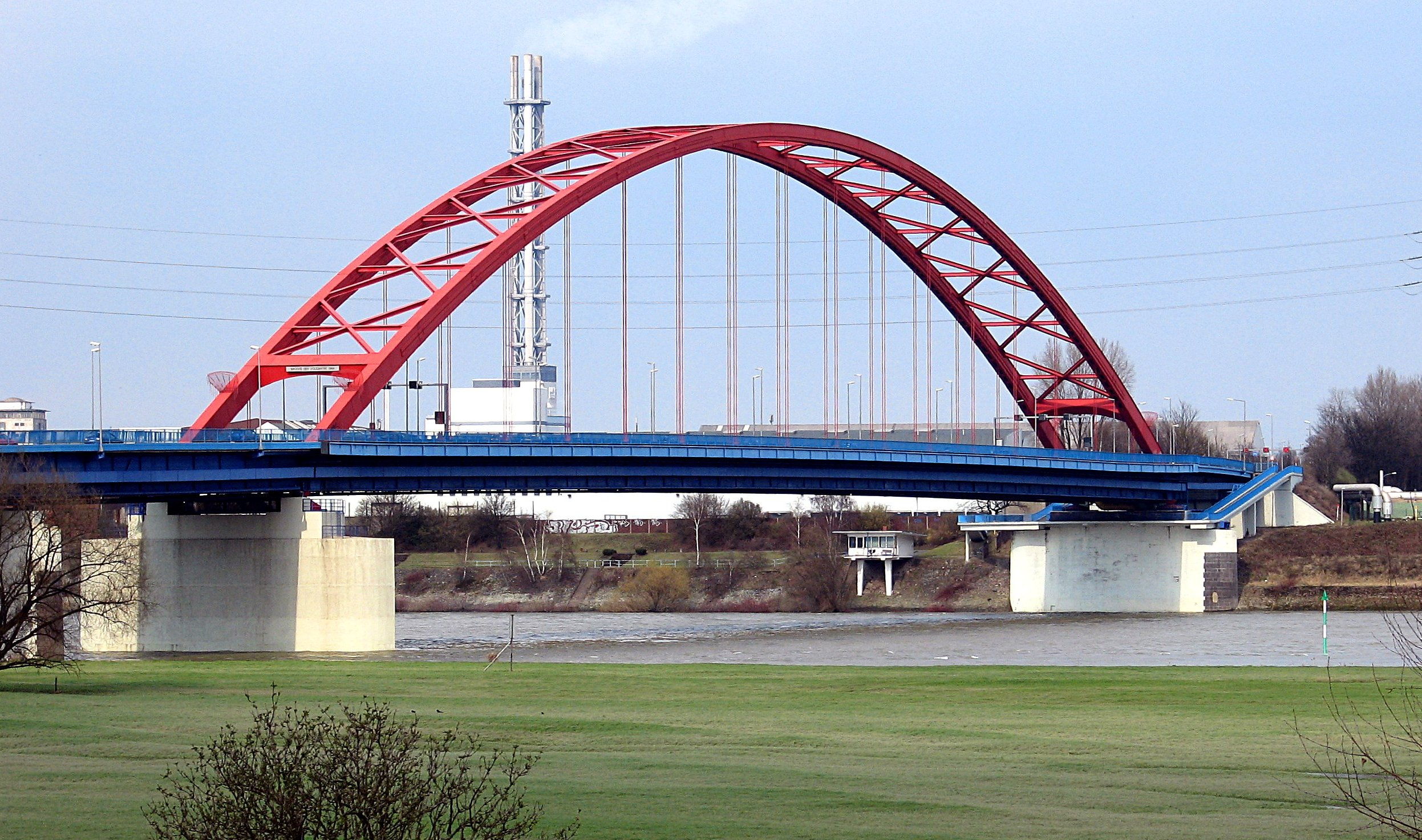 Bildbeschreibung: „Brücke der Solidarität“ über den Rhein in Duisburg Fotograf/Zeichner: Benutzer:AlterVista Datum: April 2006